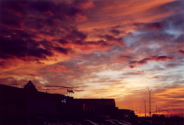 Abendhimmel über der West Edmonton Mall, Edmonton, Kanada